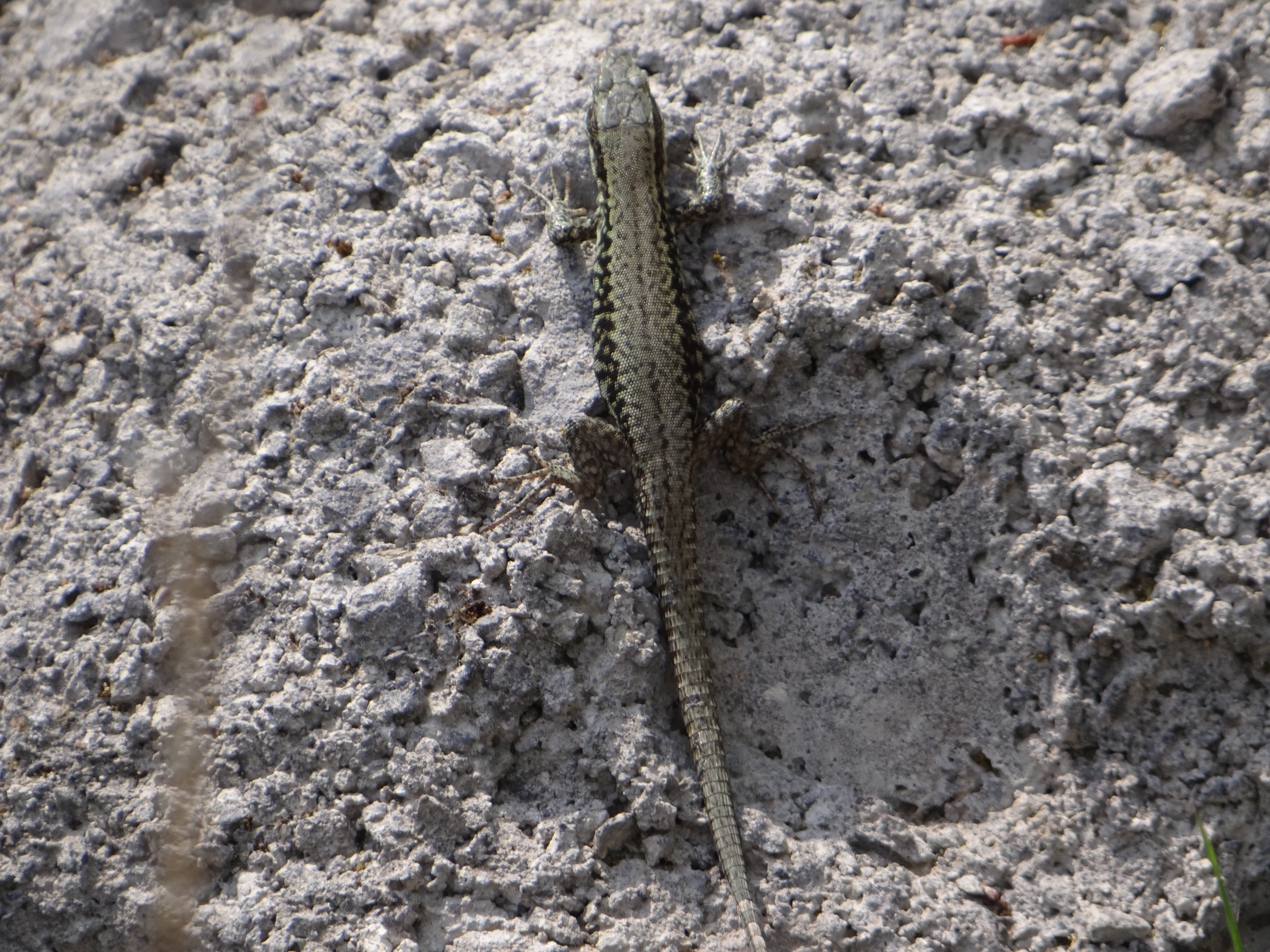 Mauereidechse (Podarcis muralis) im Mayener Grubenfeld